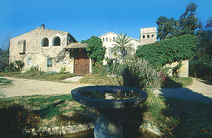 Masia Can Butinyà (Badalona)